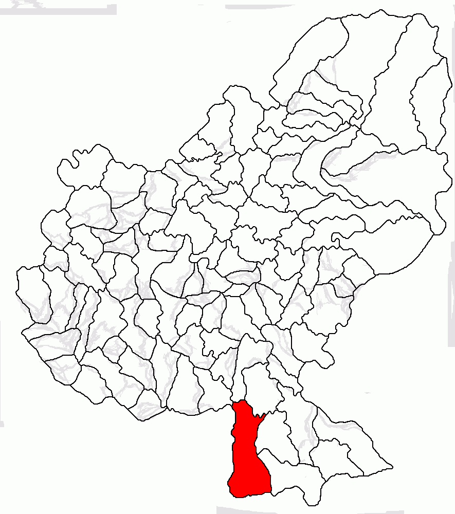 Categorie:Hărţi ale judeţului Mureş